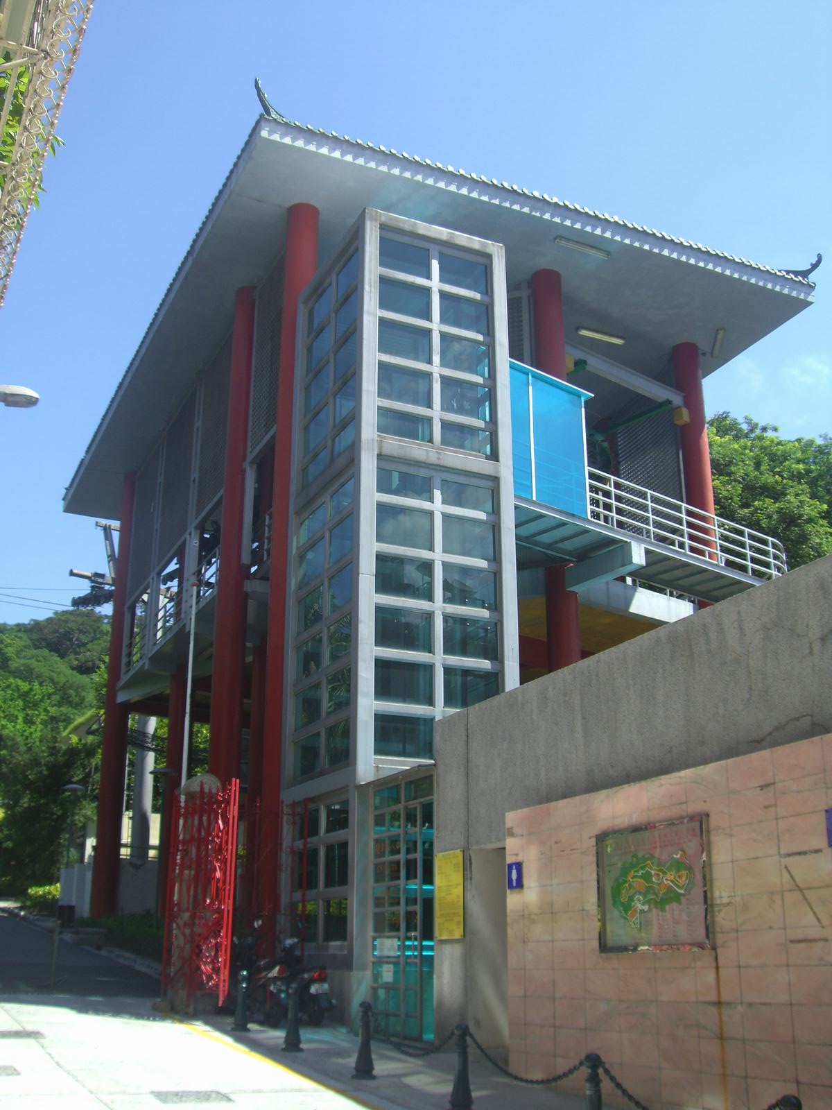 松山纜車山下站